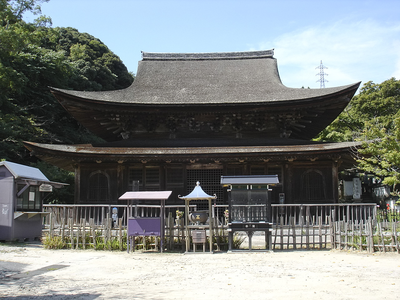 下関市功山寺の仏殿（2007年9月28日、Wiki708撮影）。Category:下関市の画像、Category:日本の寺の画像